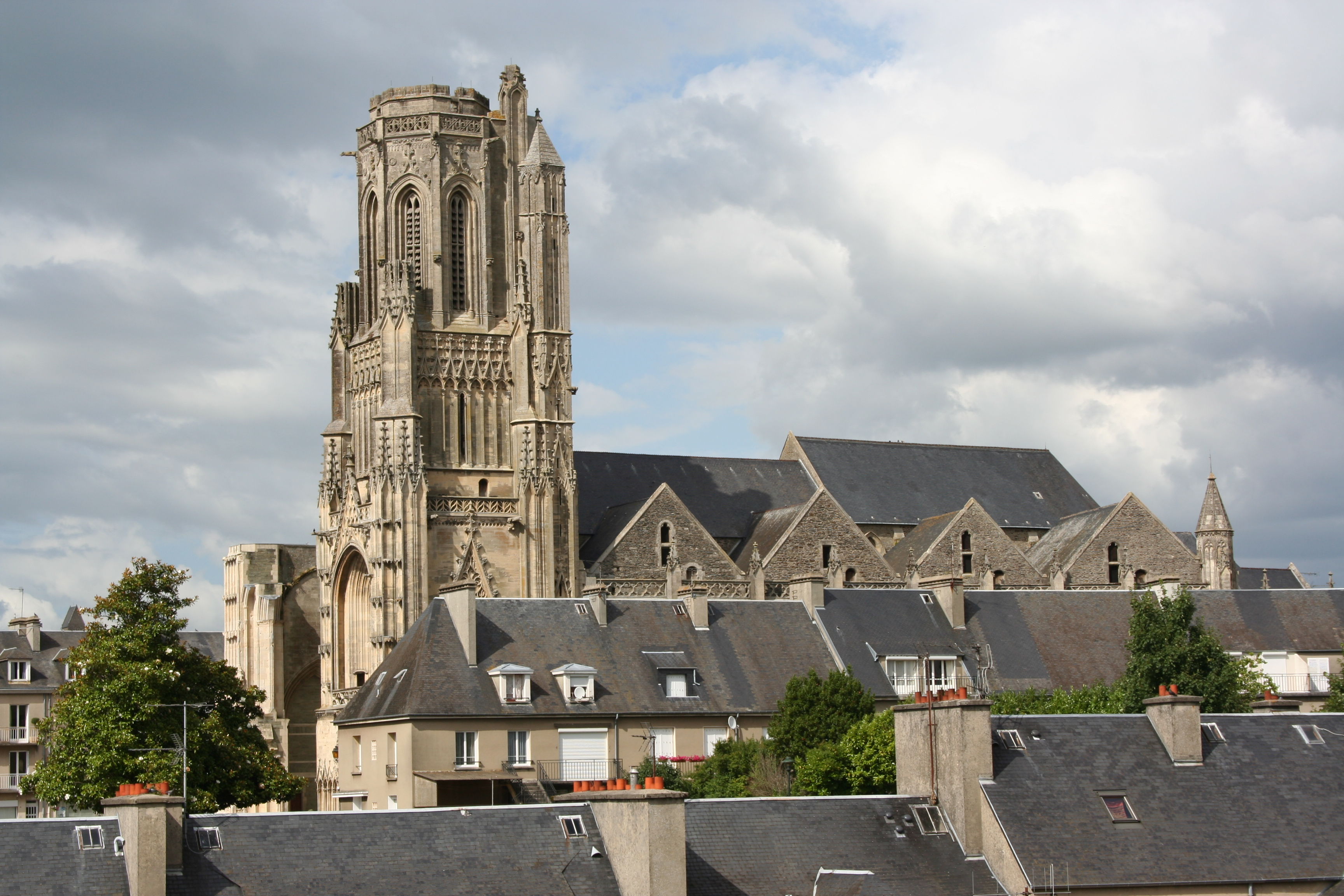 Église Notre-Dame prise depuis l'autre "rive" du Torteron - Saint-lô - France